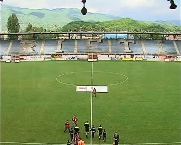 Partita di calcio Rieti-L'Aquila, terminata 4-1, del campionato di serie D disputata il 21 maggio 2017 allo stadio Centro d'Italia-Manlio Scopigno di Rieti